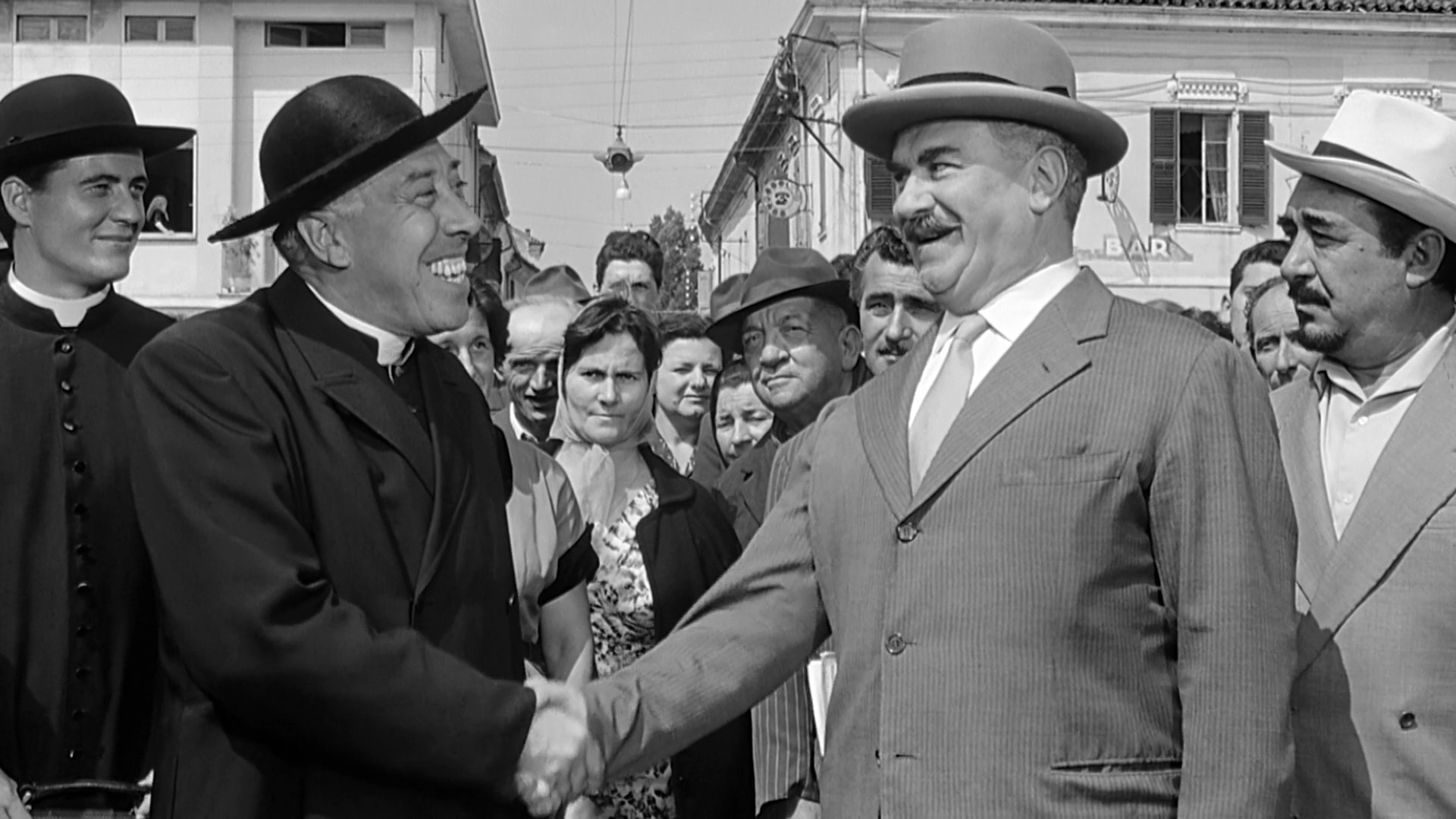 Creato e caricato dall' Utente:Lodewijk_Vadacchino, screenshot del film "Don Camillo monsignore... ma non troppo", anno 1961.